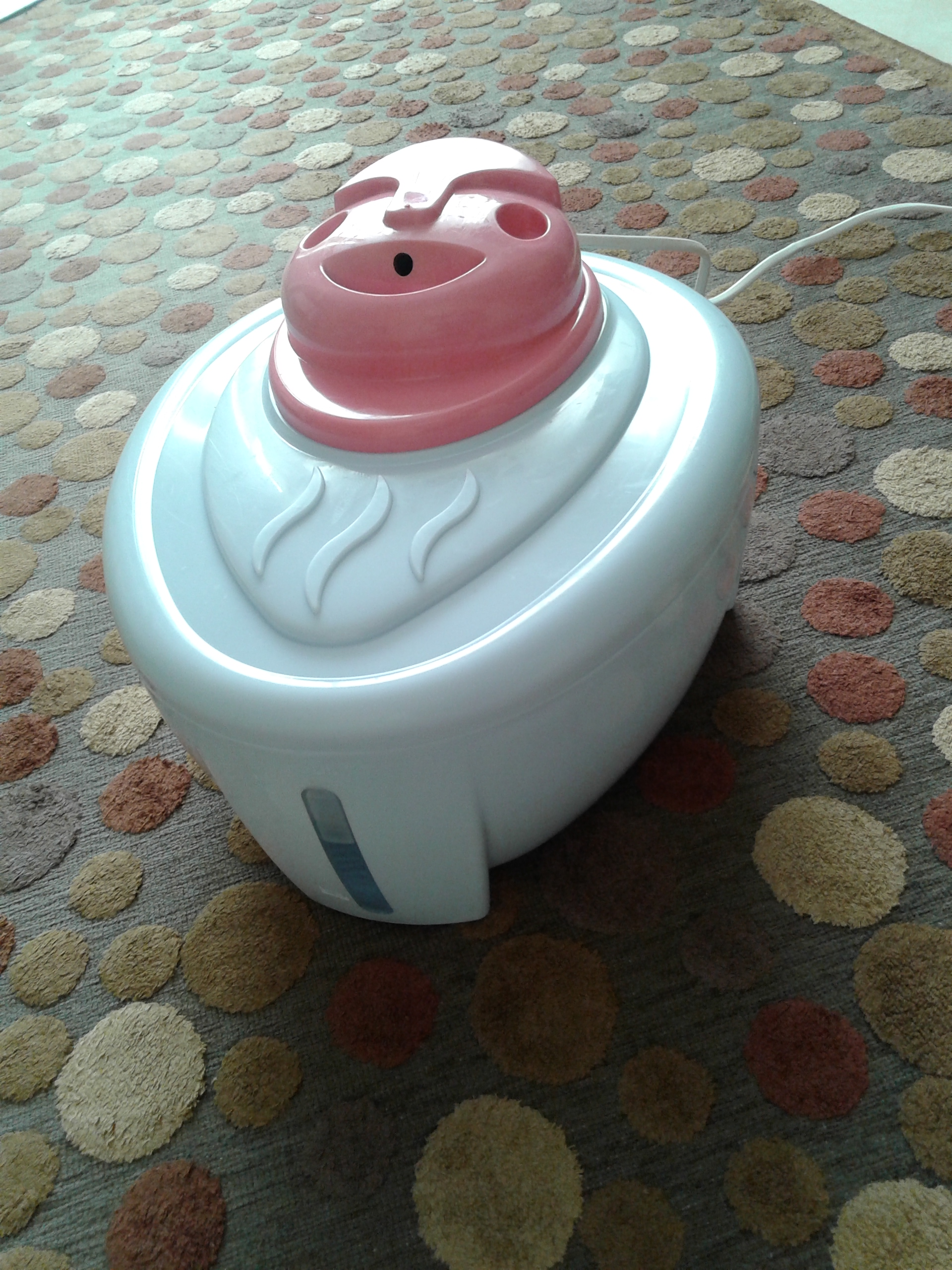 نگاره‌ای از یک دستگاه بخور گرم که به برق متصل و درحال کار می‌باشد.